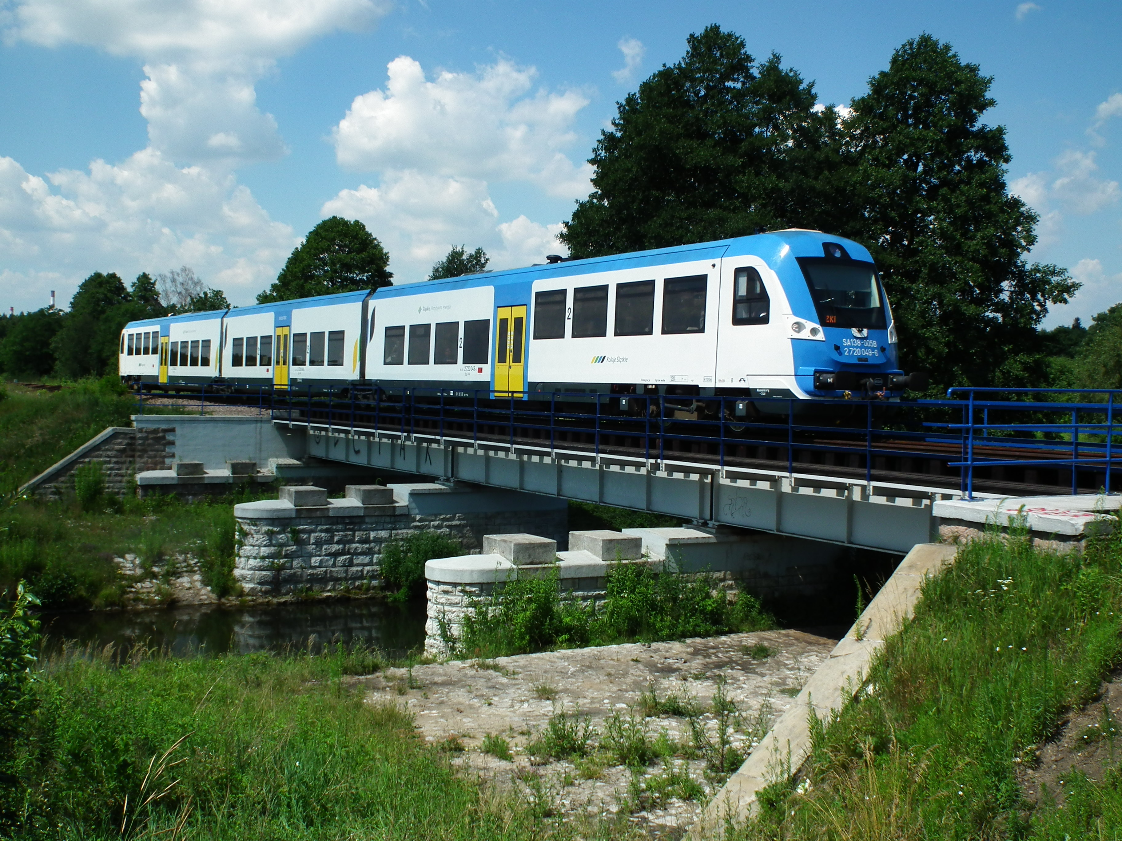 Impreza kolejowa pt. Zagłębiowskie Zakamarki, zorganizowana w dniu 2.7.2016r. na liniach Zagłębia Dąbrowskiego i obsługiwana przez SA138-005. Most na Czarnej Przemszy - Łagisza Niepiekło.